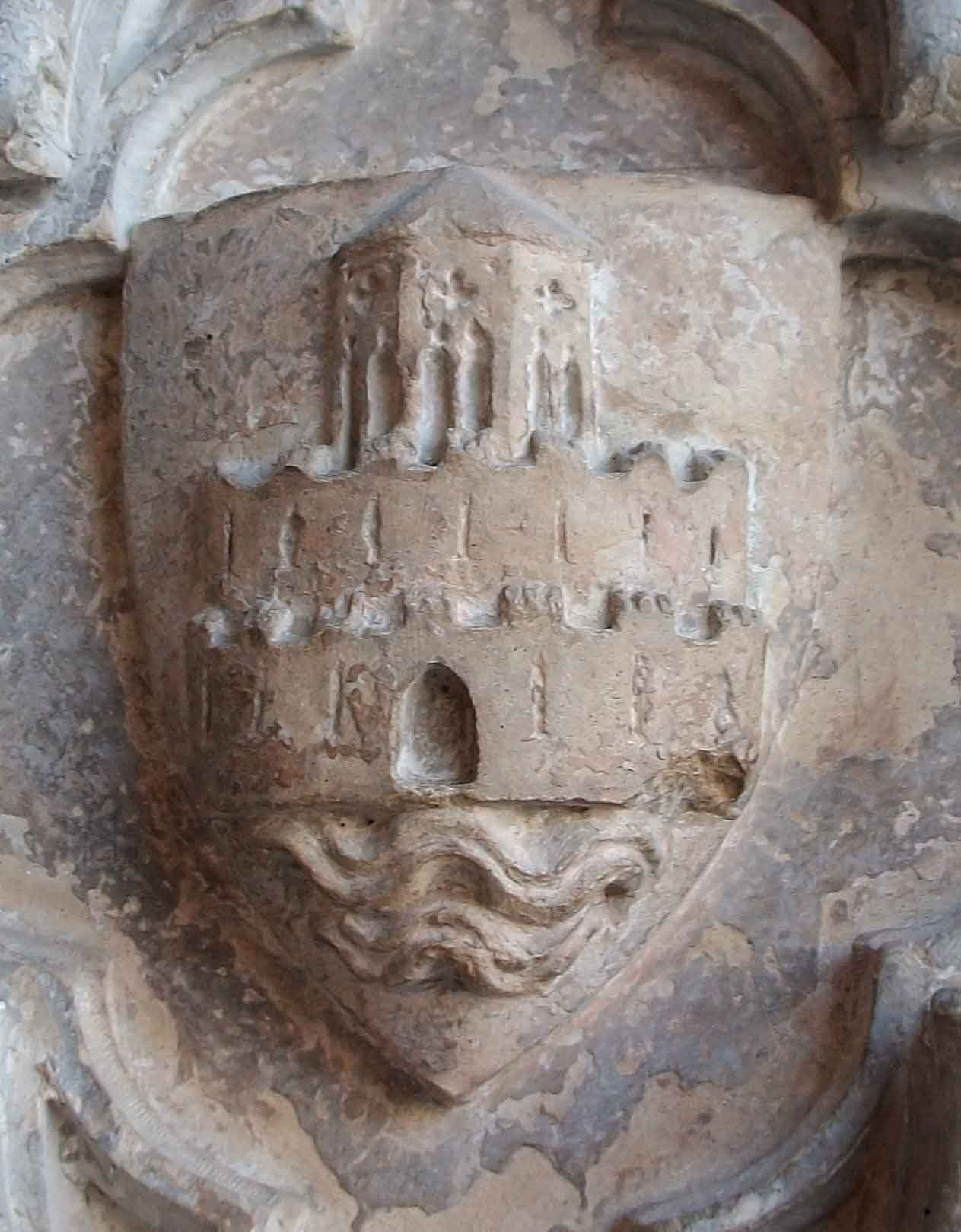 Detalle de la puerta gótica o «Puerta de los Apóstoles» de la Catedral de Santa María de Valencia (España). Este escudo se ha atribuido por algunos autores a la ciudad de Valencia y por otros a la familia del obispo Jazperto de Botonach (1, 2, 3). Aparece junto a otros escudos de familias importantes que contribuyeron a la catedral, incluidos varios escudos con el Señal Real (1). Se asemeja a una imagen (con una ciudad amurallada) que aparece en uno de los primeros sellos de la ciudad, de 1312, lo que puede haber dado pie a la confusión.